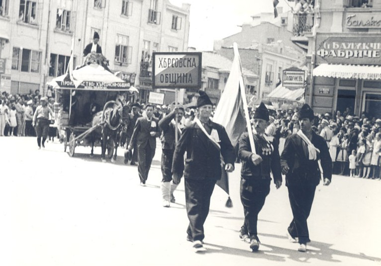 4-ти селскостопански културен и национален събор, 28 - 29 август 1938 г., Варна. Парад на участниците в събора по ул. „Княз Борис І“. На преден план са представителите на Хърсовска община.